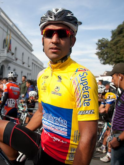 Alejandro Ramírez, líder de la Vuelta a Colombia 2012 antes de partir en la 7ª etapa